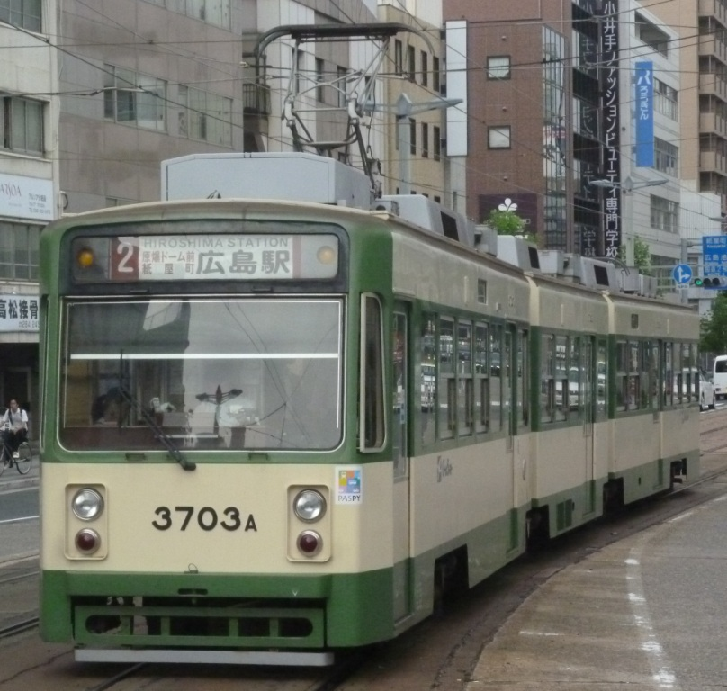 広電3703F